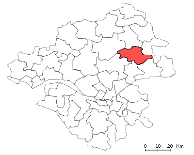 Le Canton de Riaillé en Loire-Atlantique.